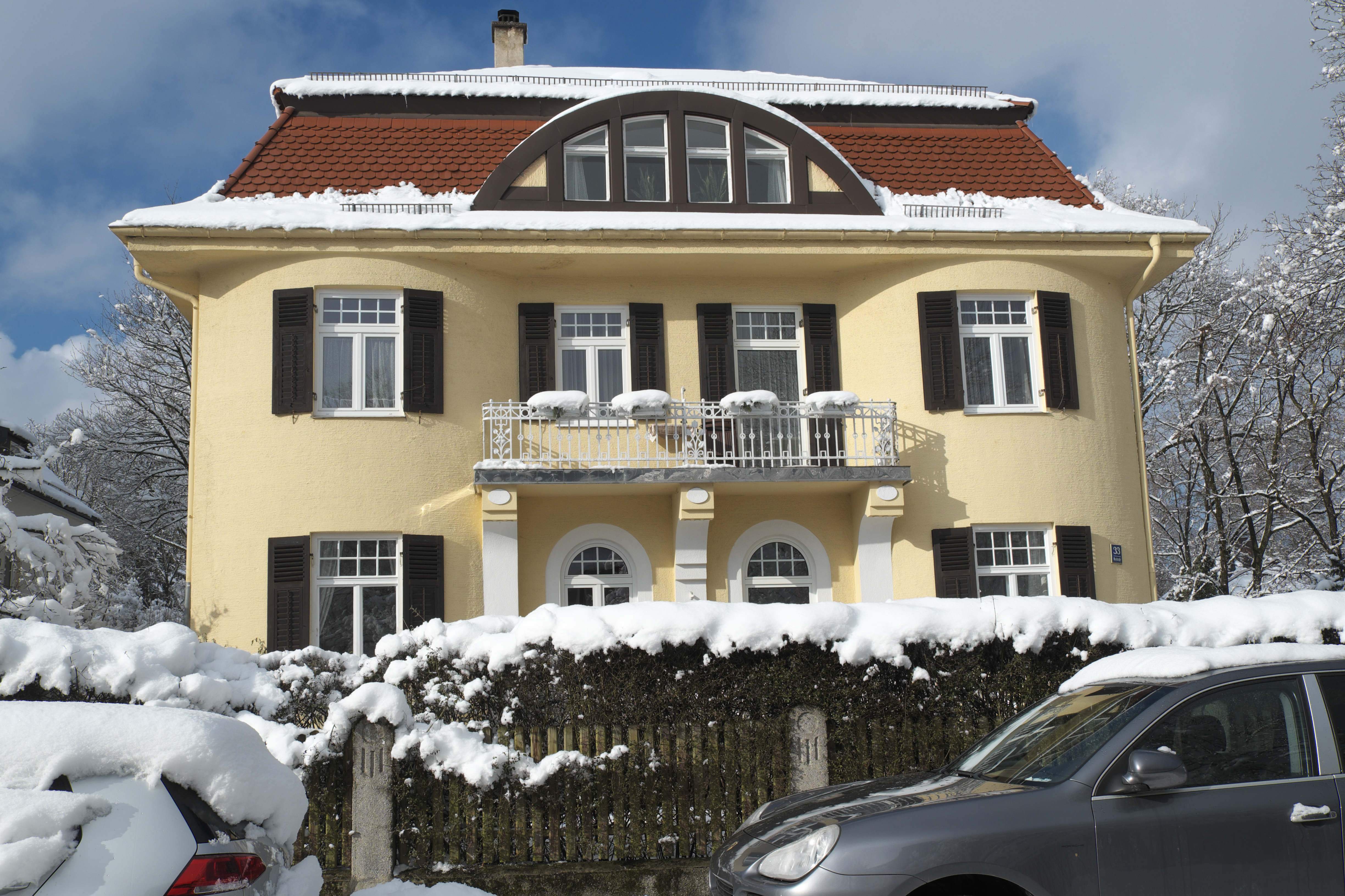 Villa in der Oselstraße 33 in Pasing im Stadtbezirk Pasing-Obermenzing in München (Bayern/Deutschland), 1908 von Georg Völkl erbaut